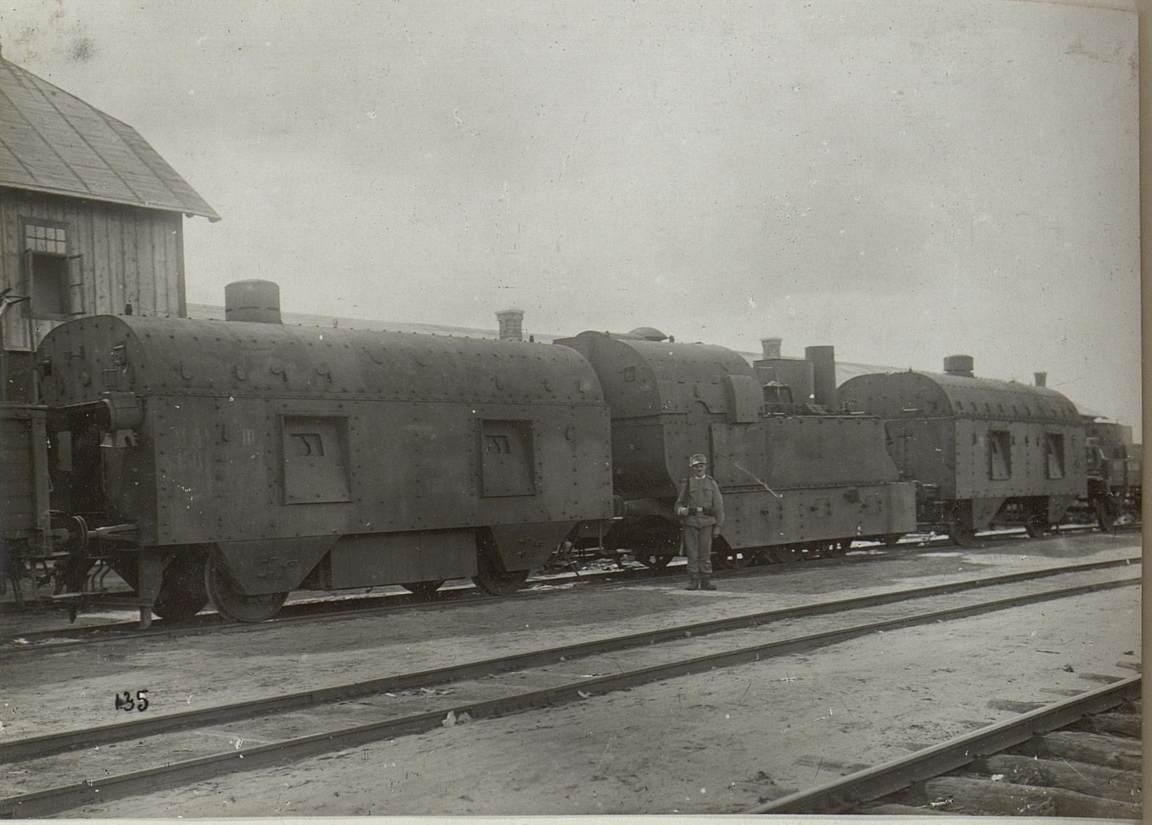 Kowel: Panzerzug.